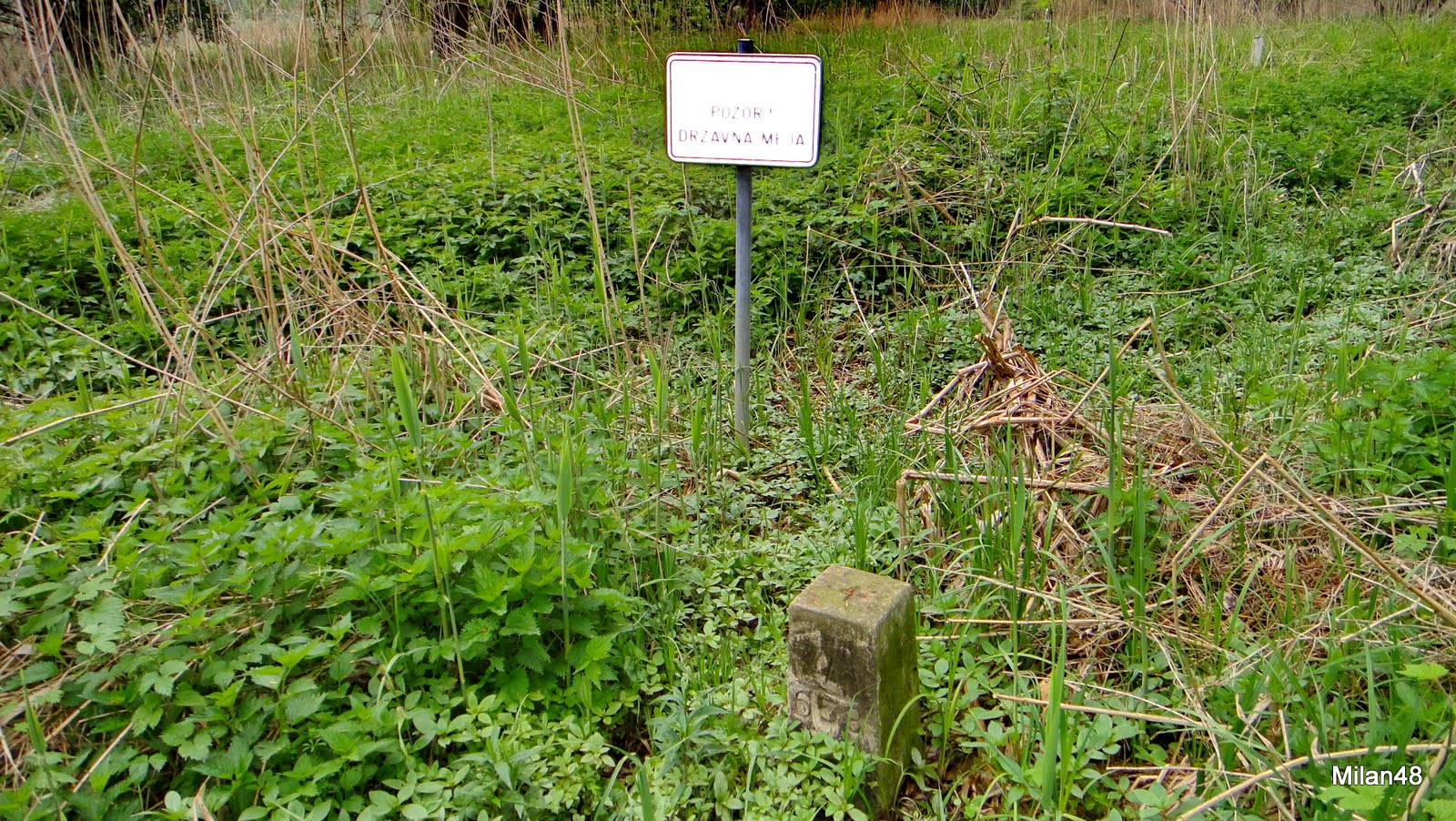 Tromejni kamen 653 med H, CR in SLO.